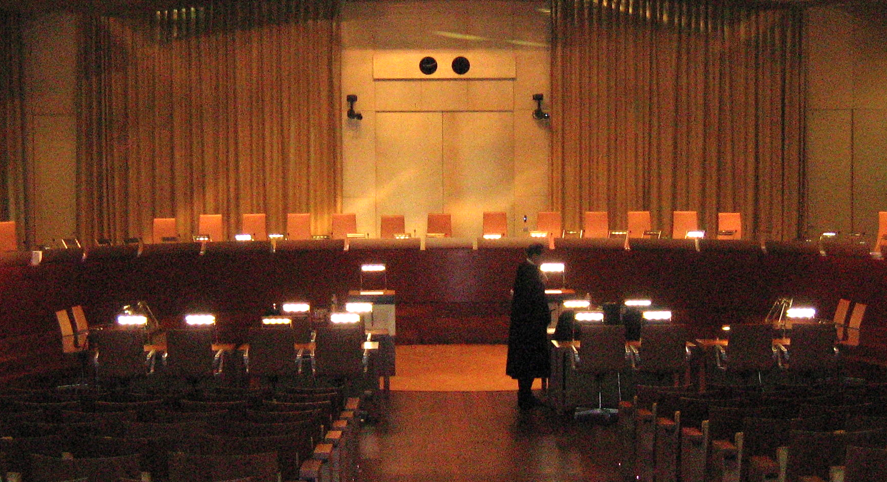 EuGH mit Saal für die große Kammer mit 13 Richter (Oktober 2010)